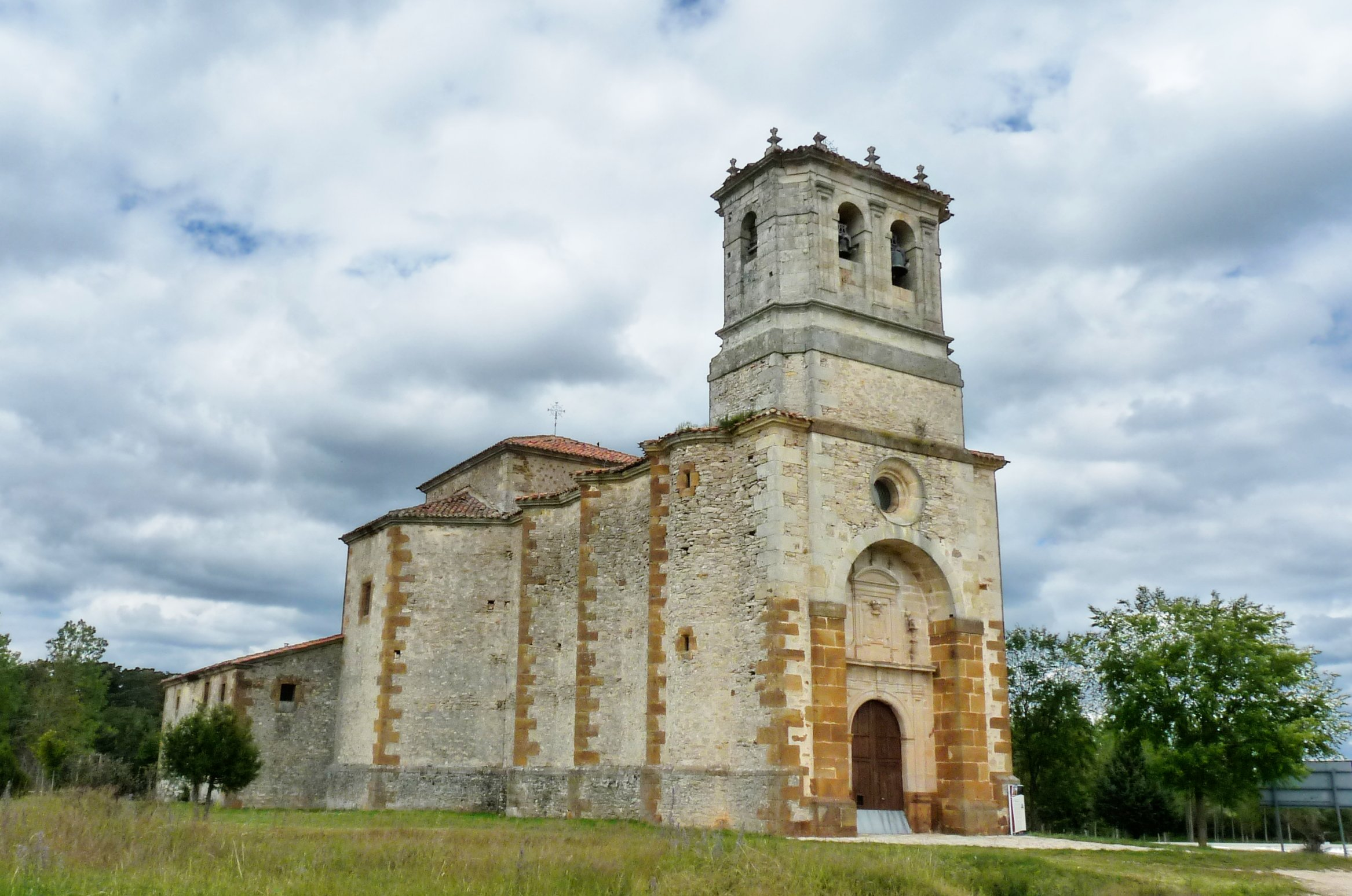 Cabrejas del Pinar - Ermita de la Blanca (1789)